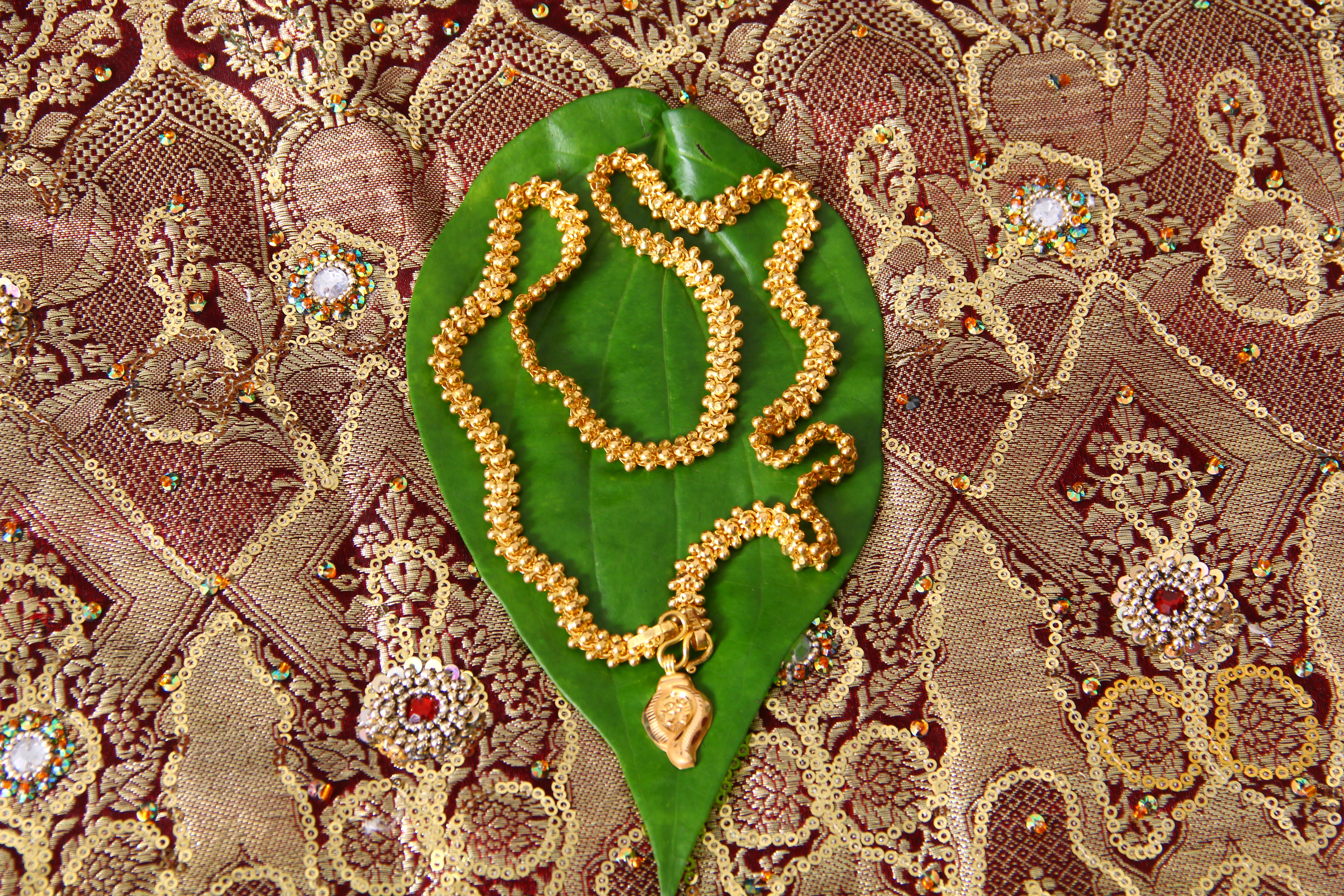 താലിമാല